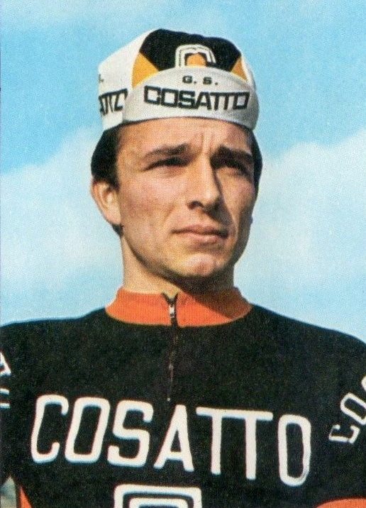 Ciclismo SPRINT '71- PANINI -Figurina n.145- MAGGIONI - ITALIA -Rec